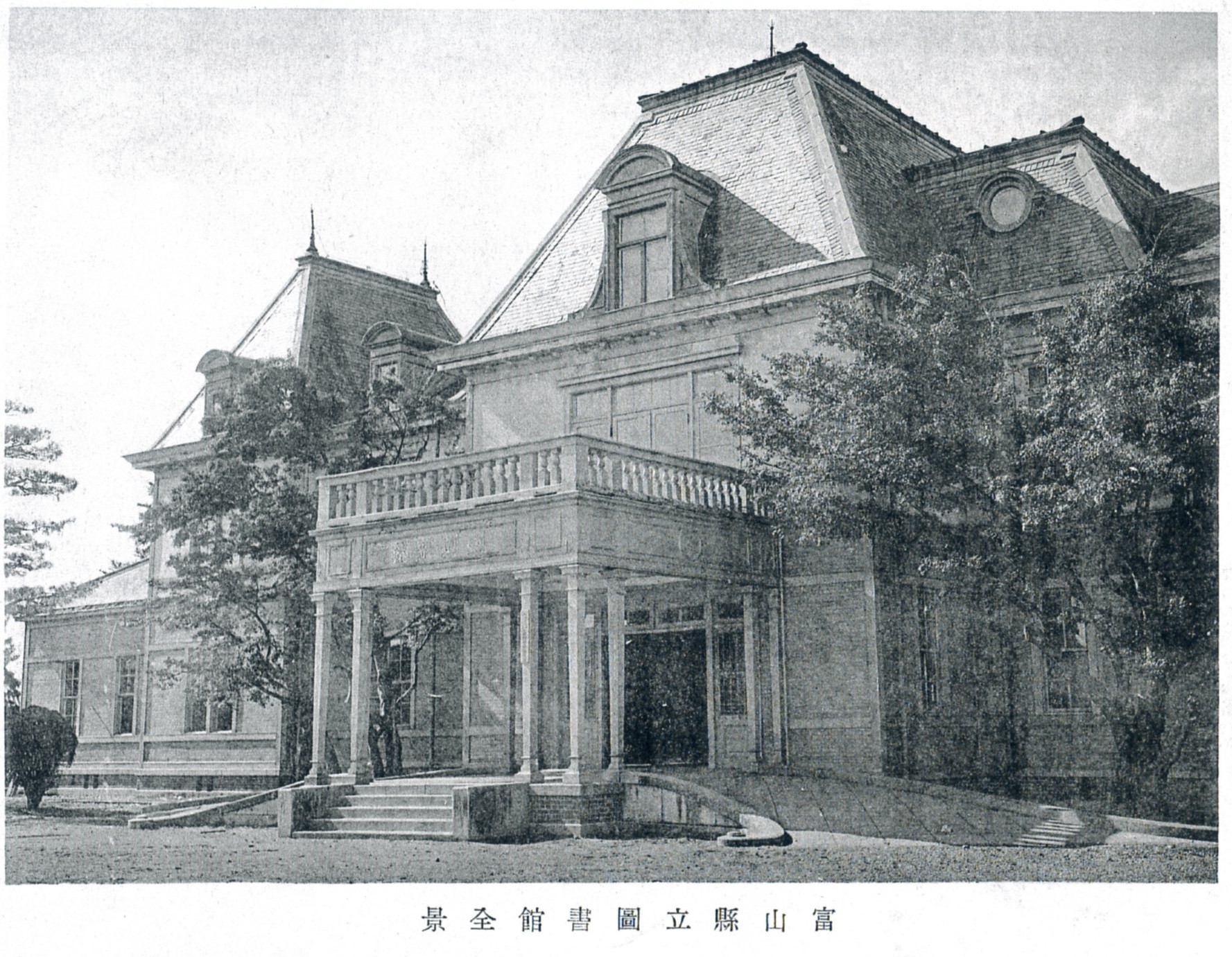 富山県立図書館全景